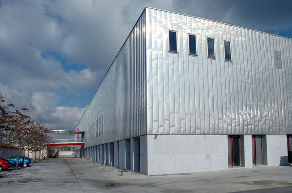 Bâtiment des Archives de l'État à Mons, sur le site des Grands Prés.